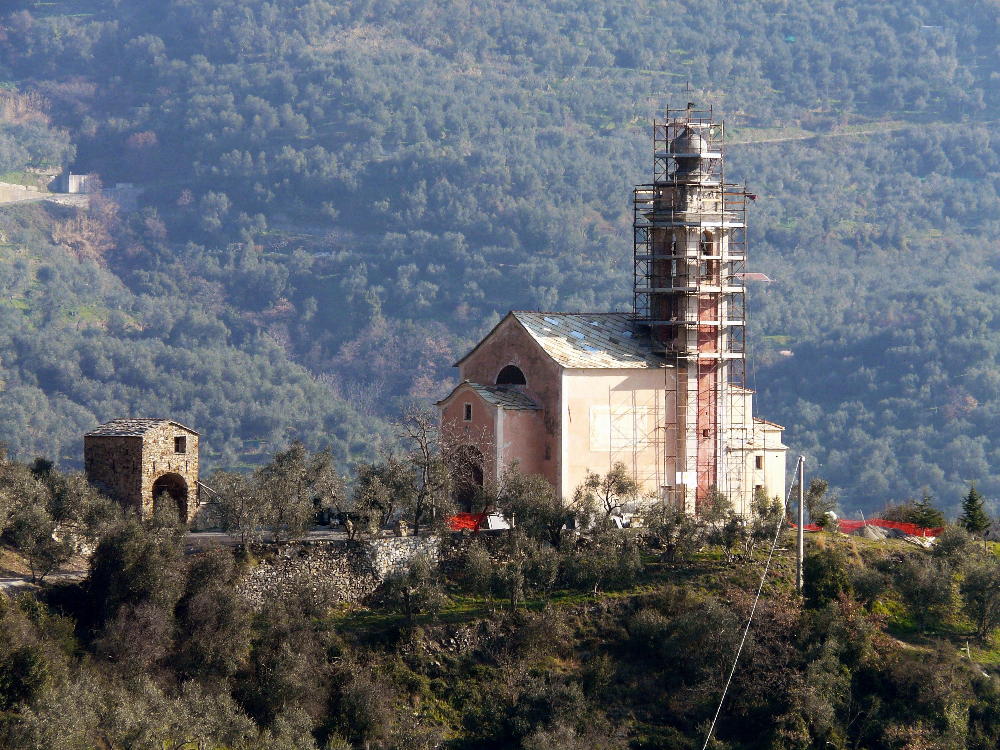 Santuario di Nostra Signora delle Vigne, Caravonica, Liguria, Italia